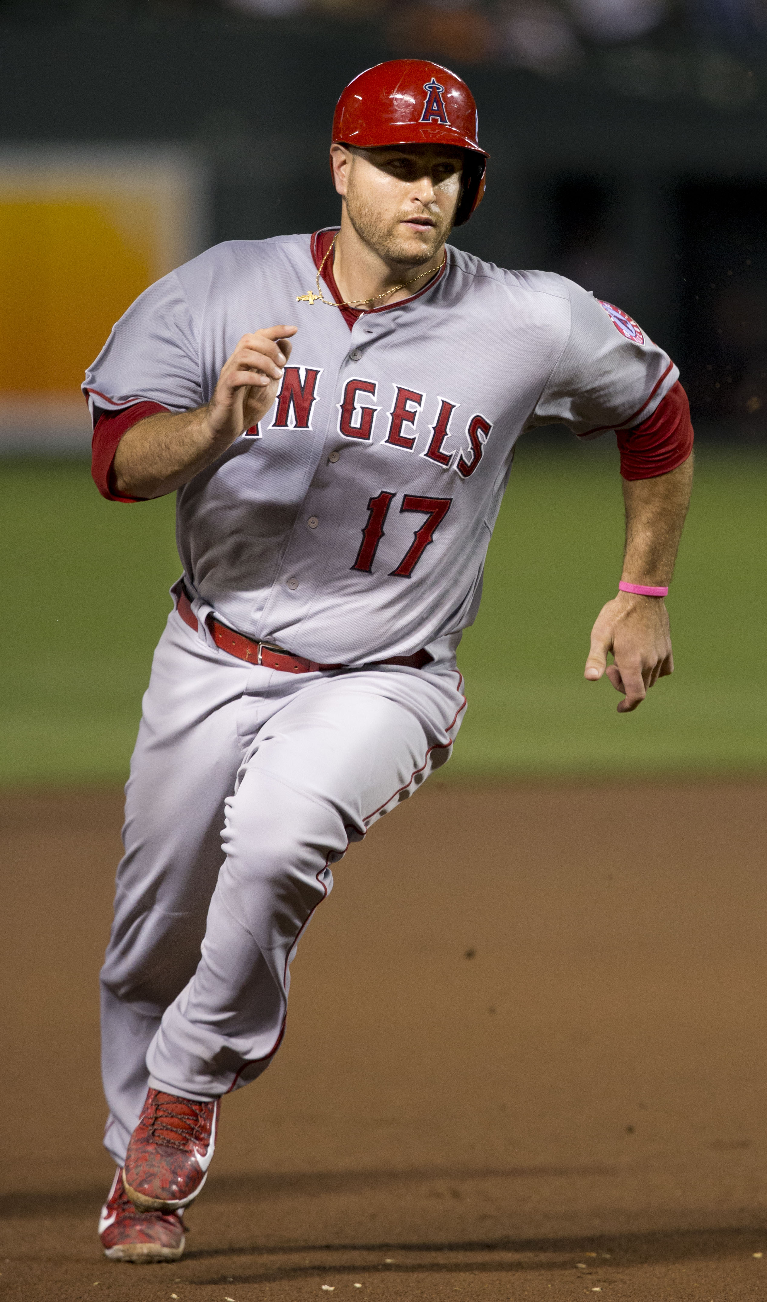 Angels at Orioles 5/16/15